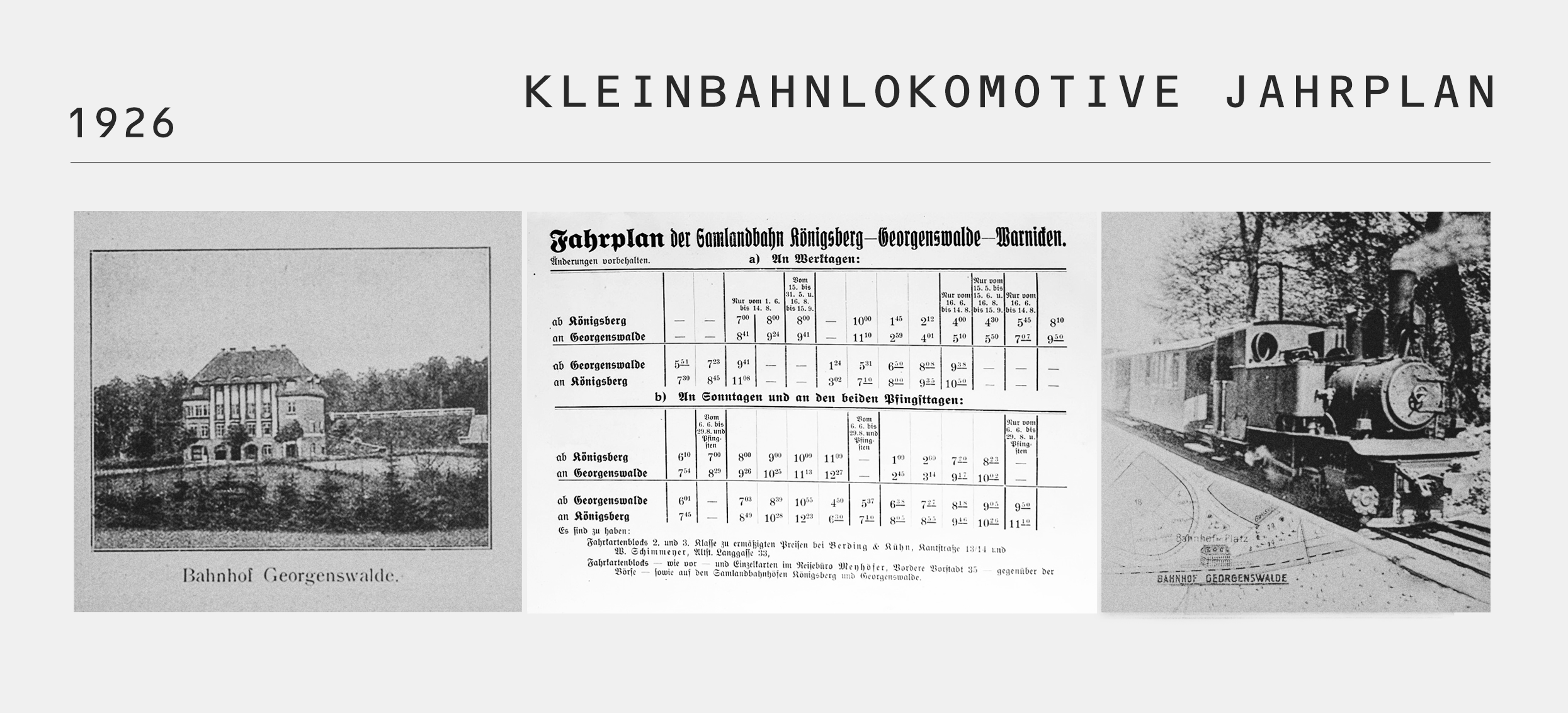 Годовой план движения локомотива узкоколейной железной дороги за 1926г.